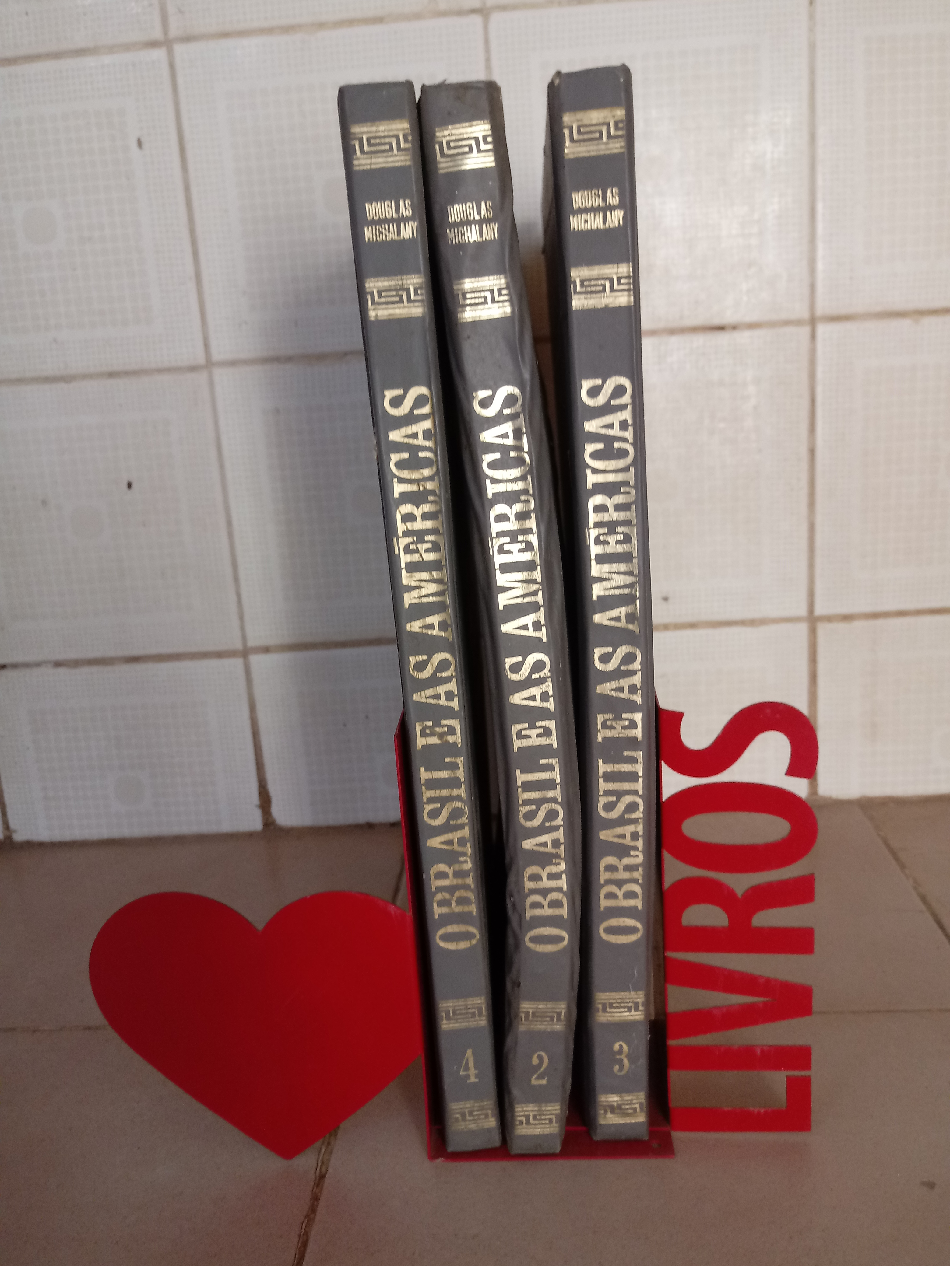 Coleção O Brasil e as Américas de Douglas Michalany na Academia Campomaiorense de Letras, em Campo Maior, no Piauí.